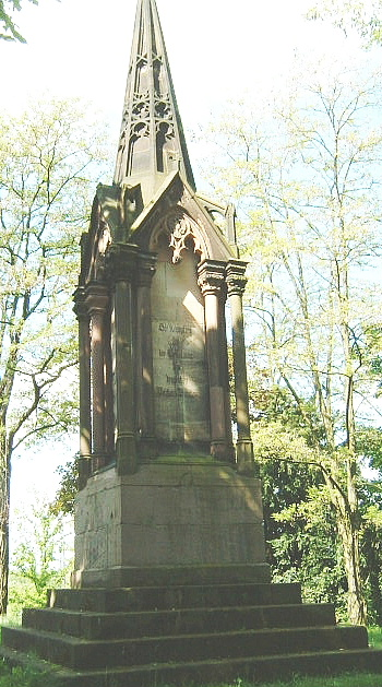 Österreicher Denkmal in der Österreicher Kolonie, einem Stadtteil von Aschaffenburg